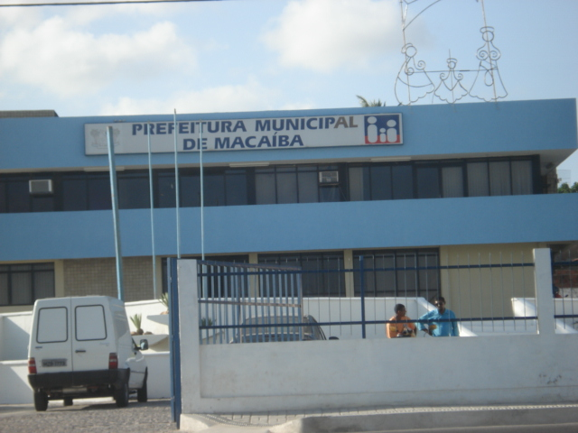 Prédio da Prefeitura de Macaíba (RN), Brasil.